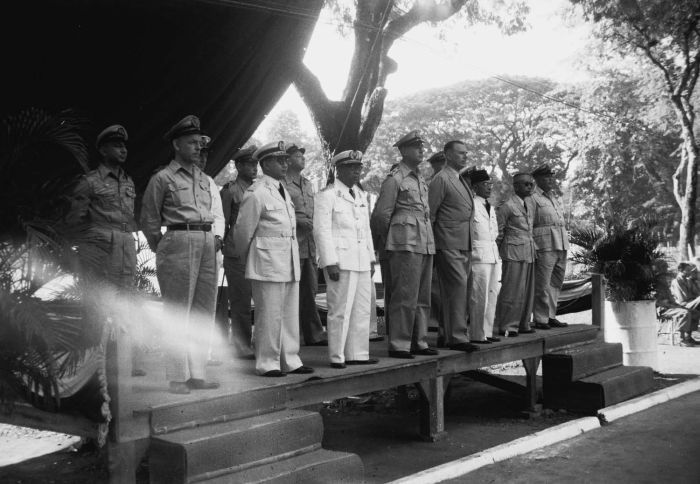 negatief. Militaire parade in Makassar ter gelegenheid van Koninginnedag, afgenomen door onder meer president Sukawati van Oost-Indonesië en kolonel Scheffelaar